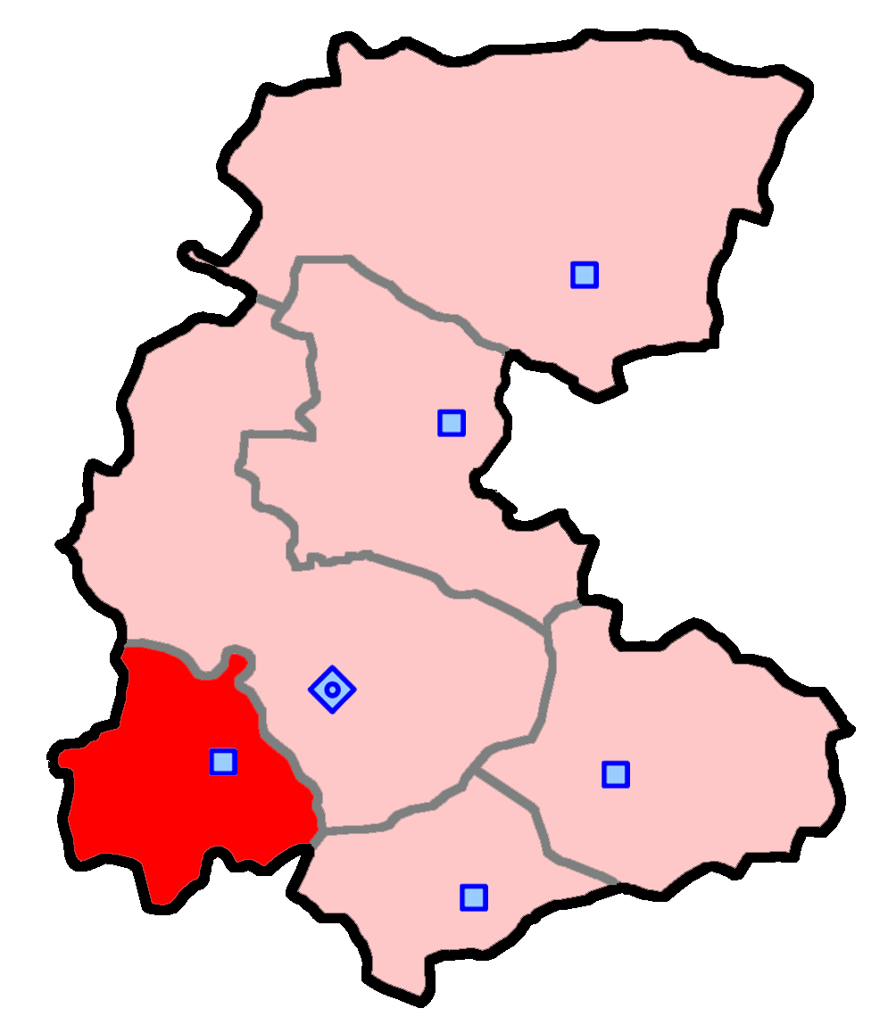 حوزهٔ انتخاباتی شازند برای انتخابات مجلس شورای اسلامی